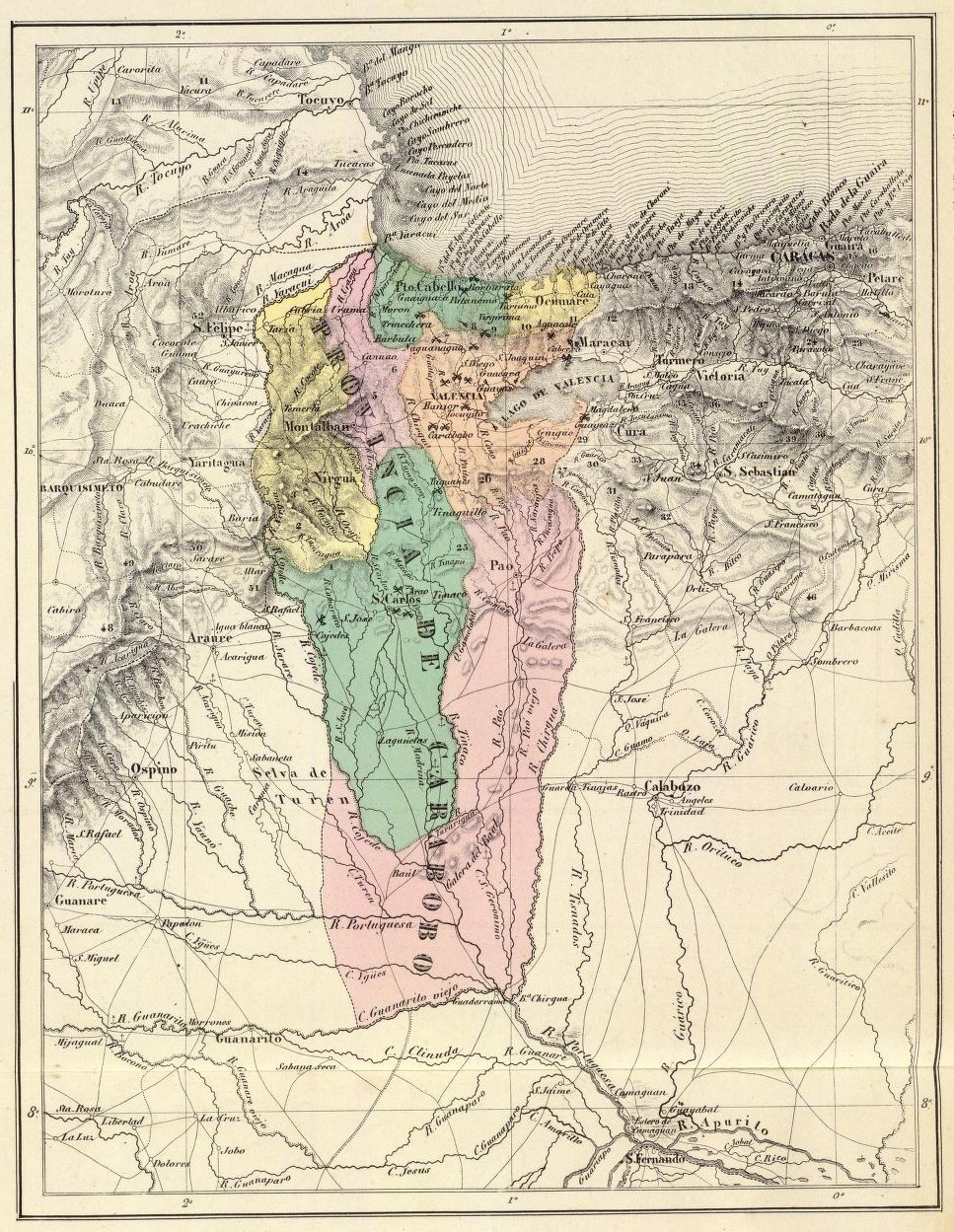 Provincia de Carabobo. Tomado del "Atlas físico y político de la República de Venezuela", 1840.